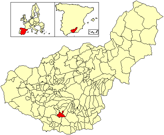 Situación del término municipal de El Pinar respecto a la provincia de Granada, en España.